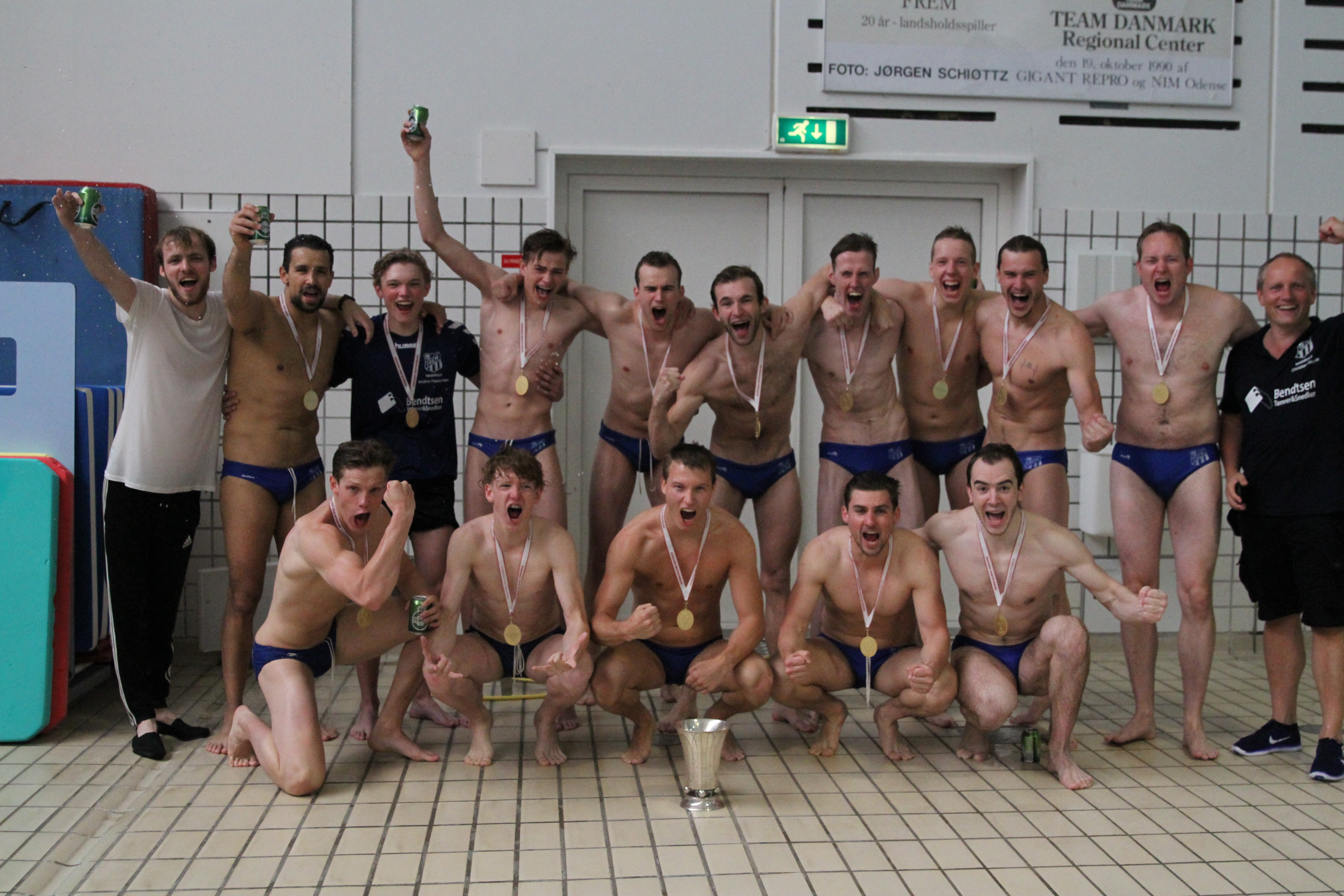 FREM Odense Danske Mestre 2017